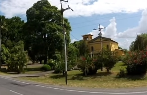 Iglesia